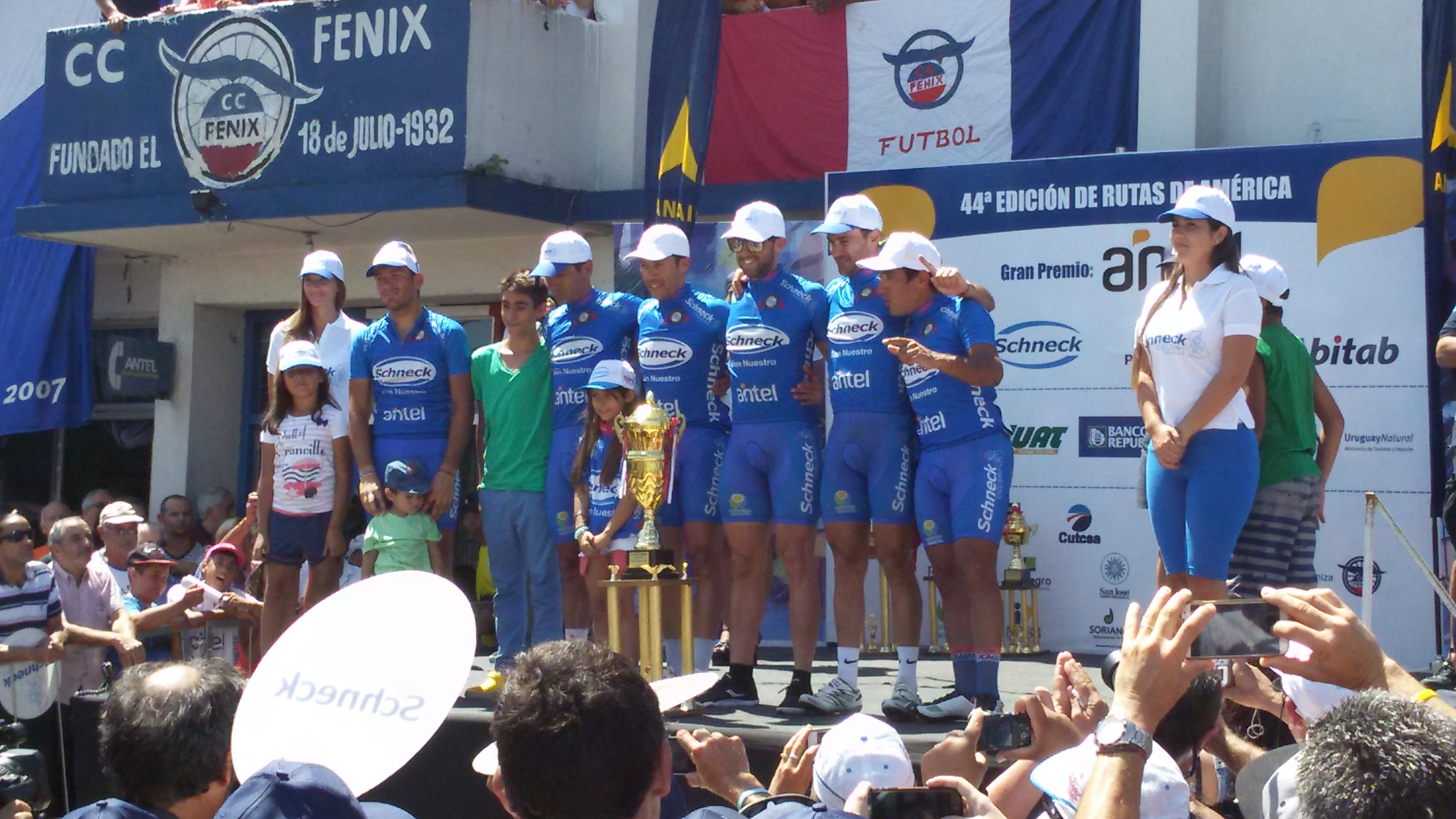 Schneck-Alas Rojas. Ganador por equipos de Rutas de América 2015